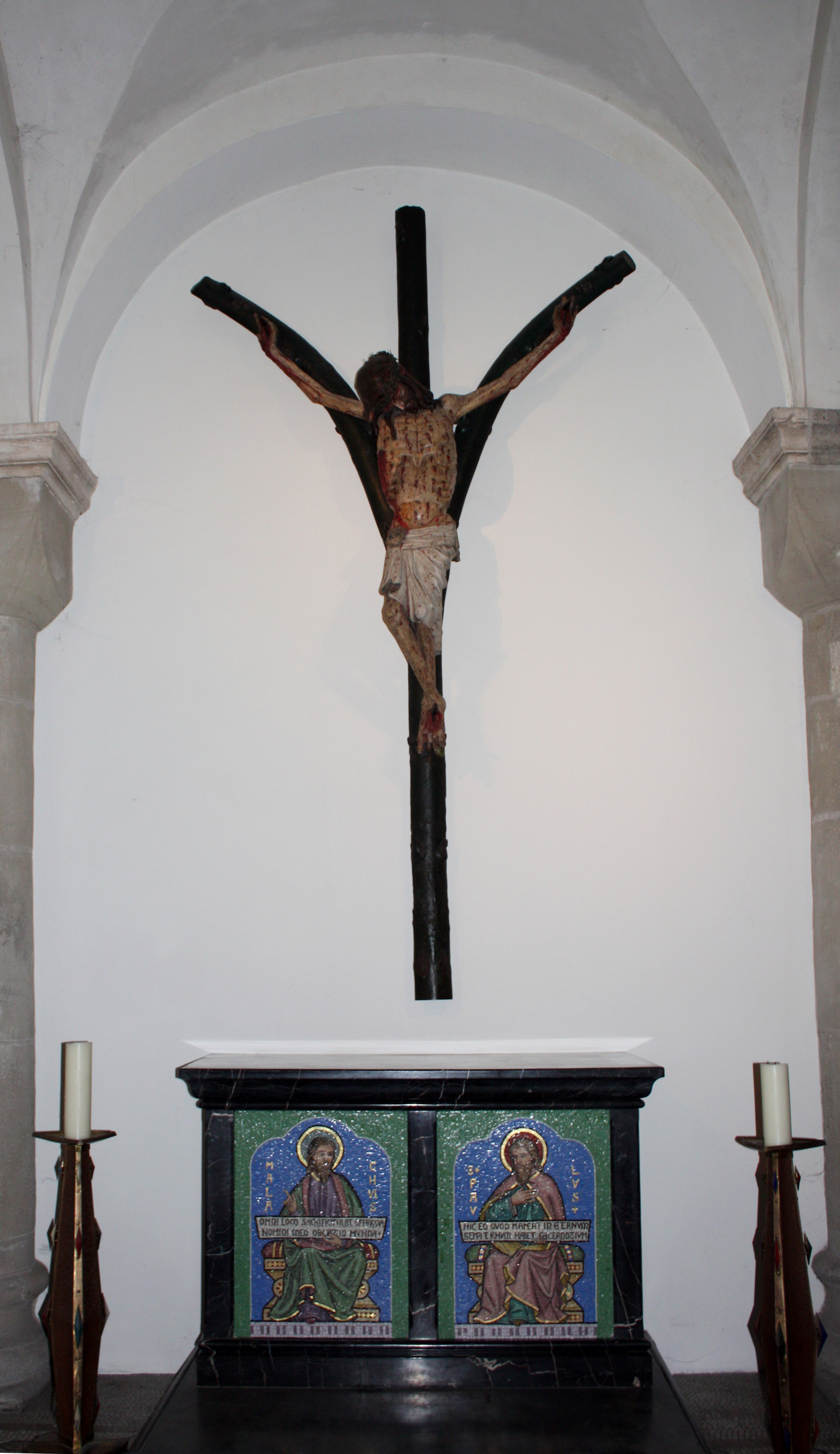 St. Maria im Kapitol, Köln. Gabelkreuz um 1304